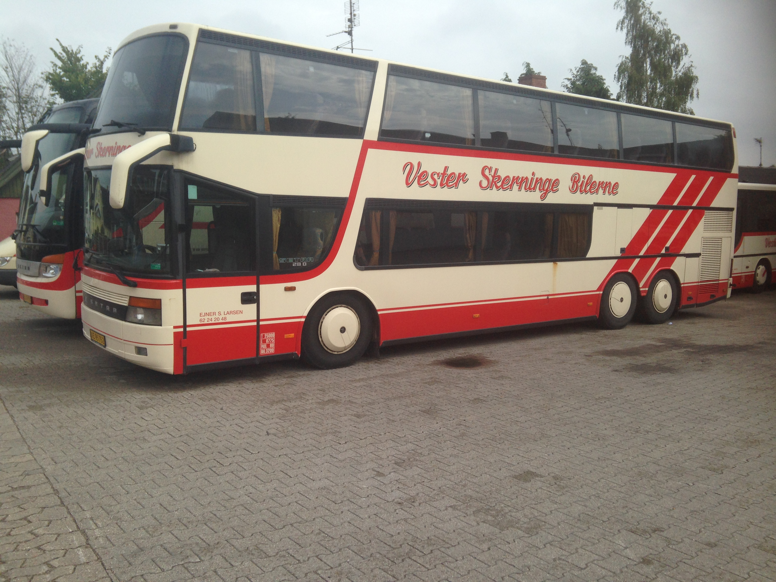 Setra S 328 DT dobbeltdækkerbus